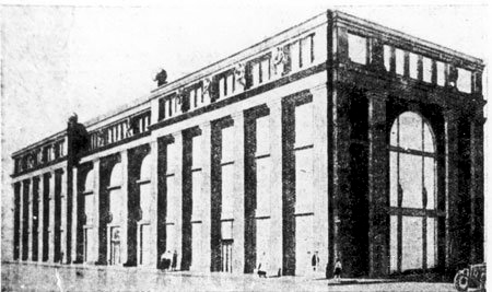 Початковий проект ЦУМу у Дніпропетровську, автор - архітектор Олександр Красносельський.